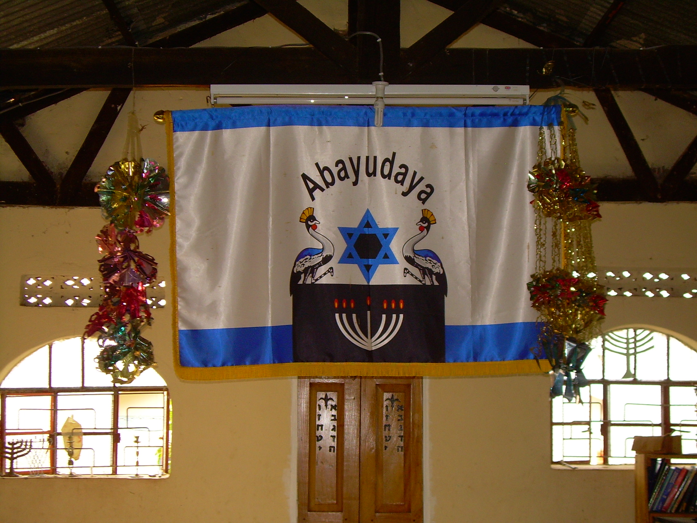 בית הכנסת של הקהילה היהודית באוגנדה